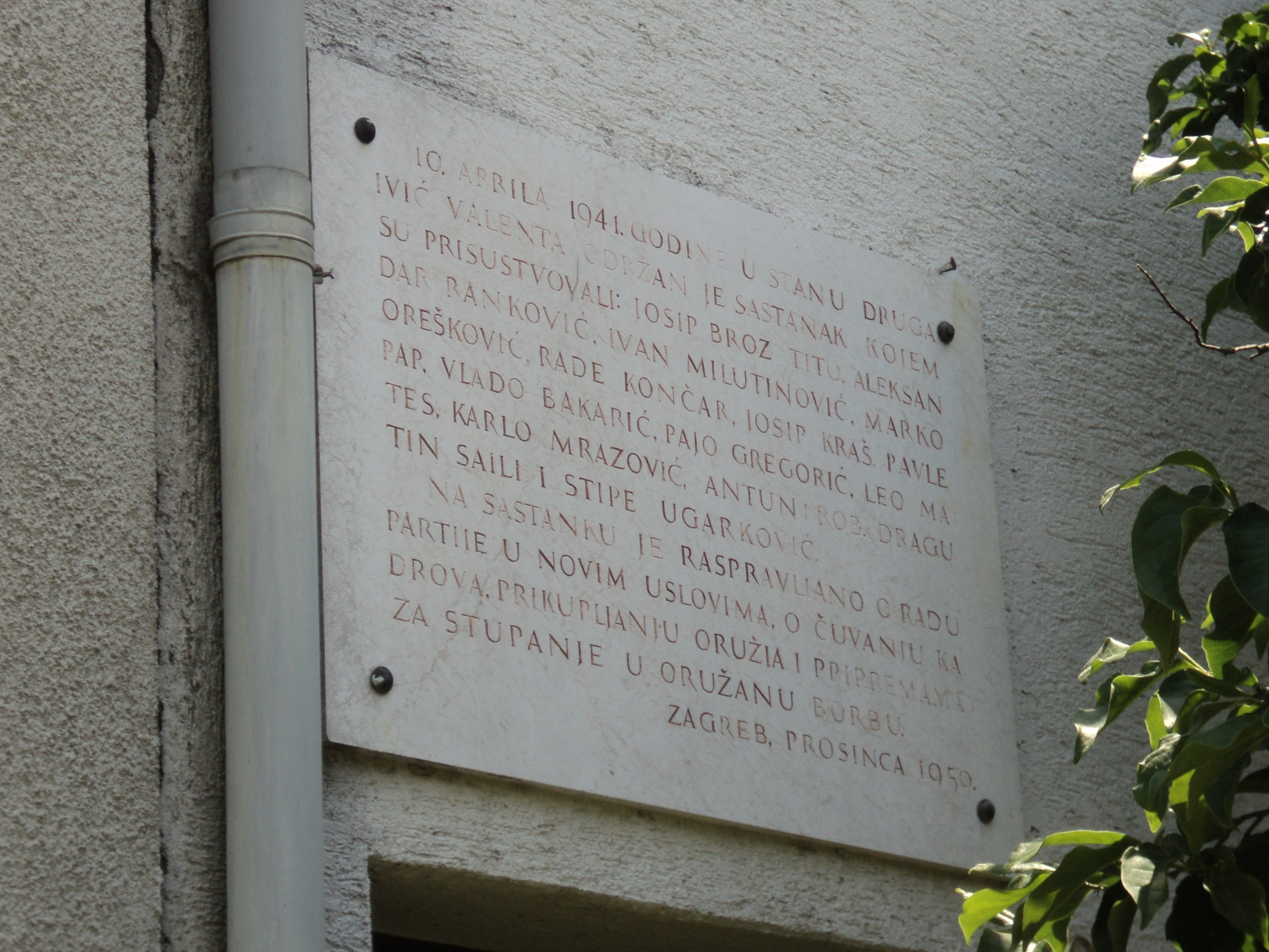 Spomen-ploča na kući u Zagrebu u kojoj je CK KPJ 10.4.1941. odlučio da kreće s pripremanjem oružanog ustanka protiv okupatora. Self-made. Jun 2011.